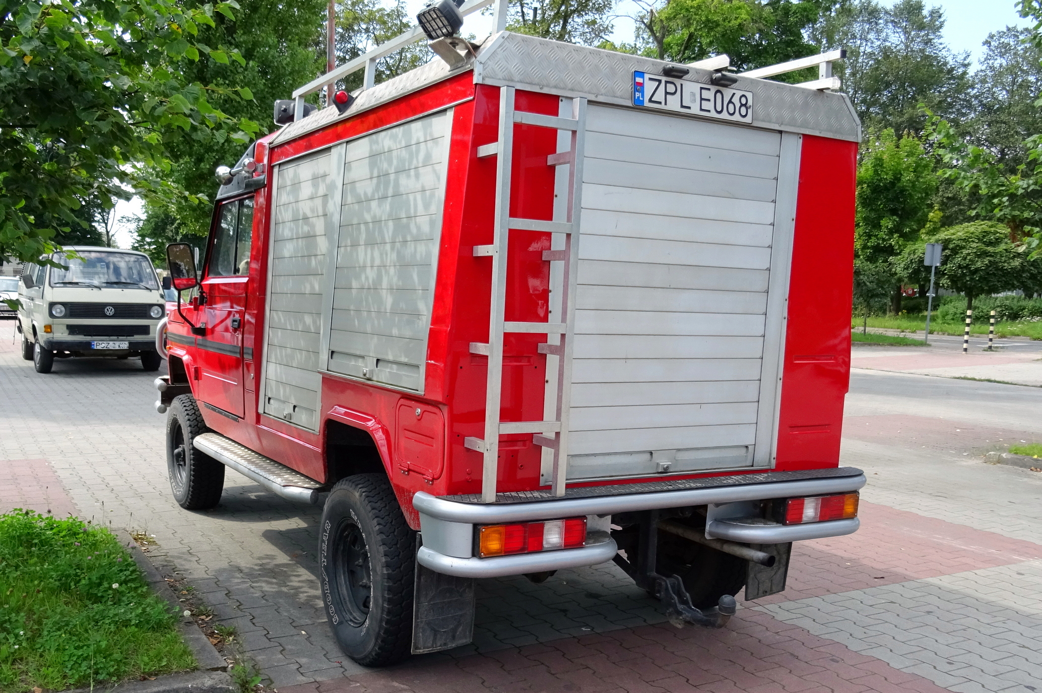 Tarpan Honker w wersji samochód pożarniczy SLRr (rozpoznawczo-ratowniczy)